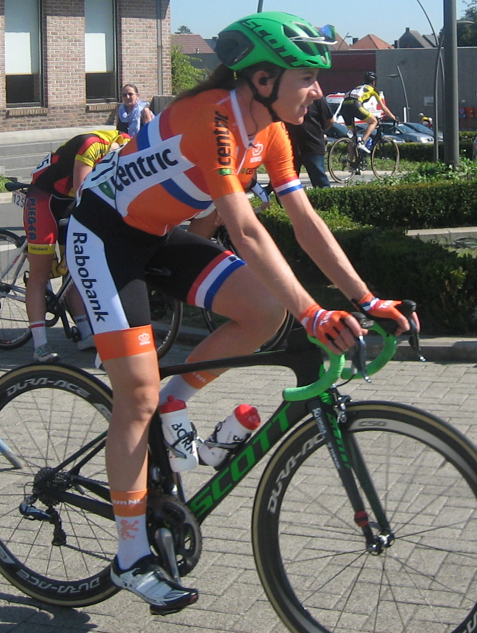 Annemiek van Vleuten (Orica-AIS, nu uitkomend namens Nederlandse selectie) voor start van 2e etappe Lotto Belgium Tour 2016